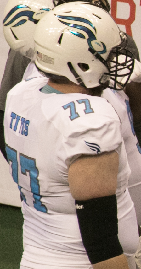 Valor 47 / Philadelphia Soul 48